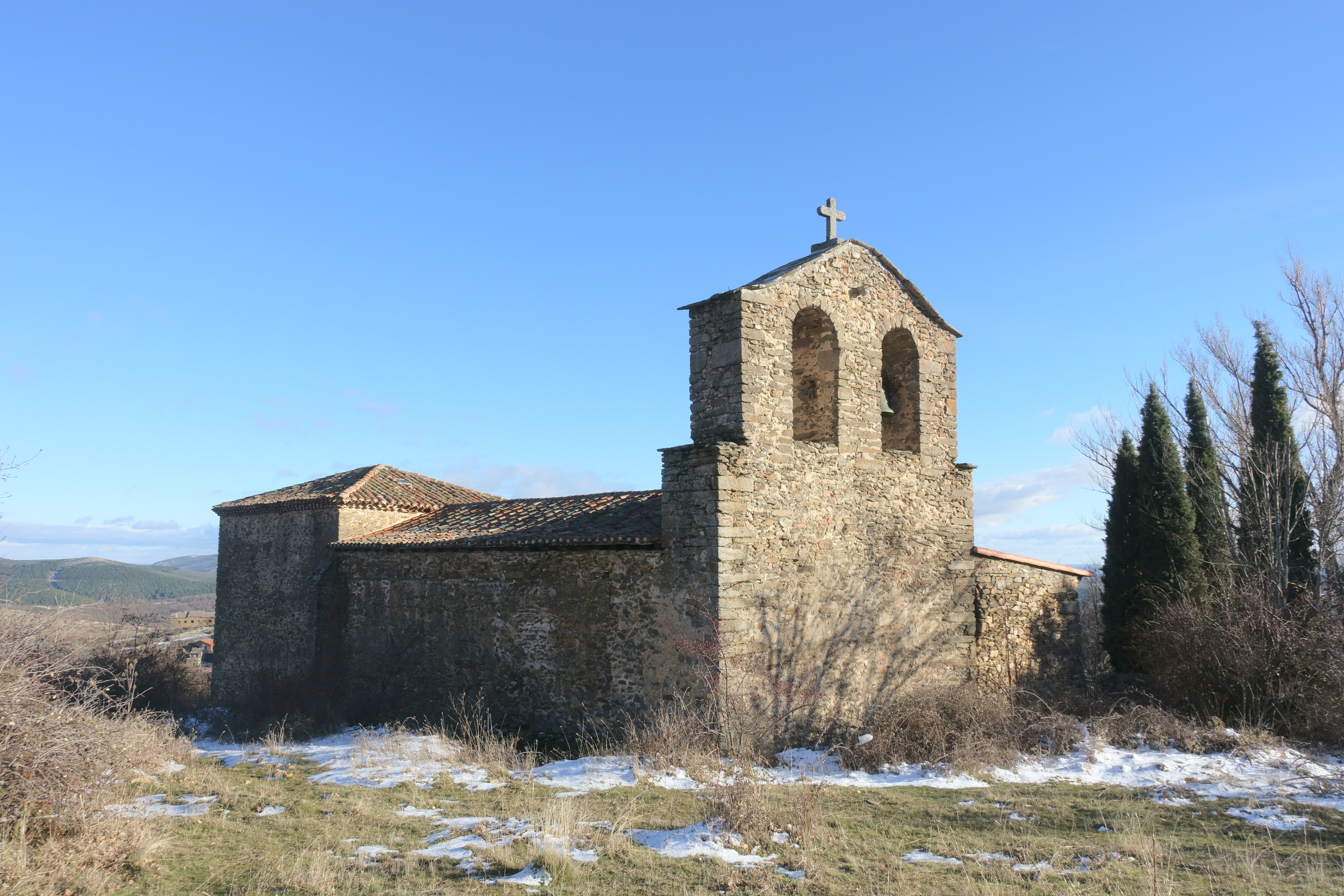 Iglesia de la Asunción de Nuestra Señora, en Gascueña de Bornova (Guadalajara, España).